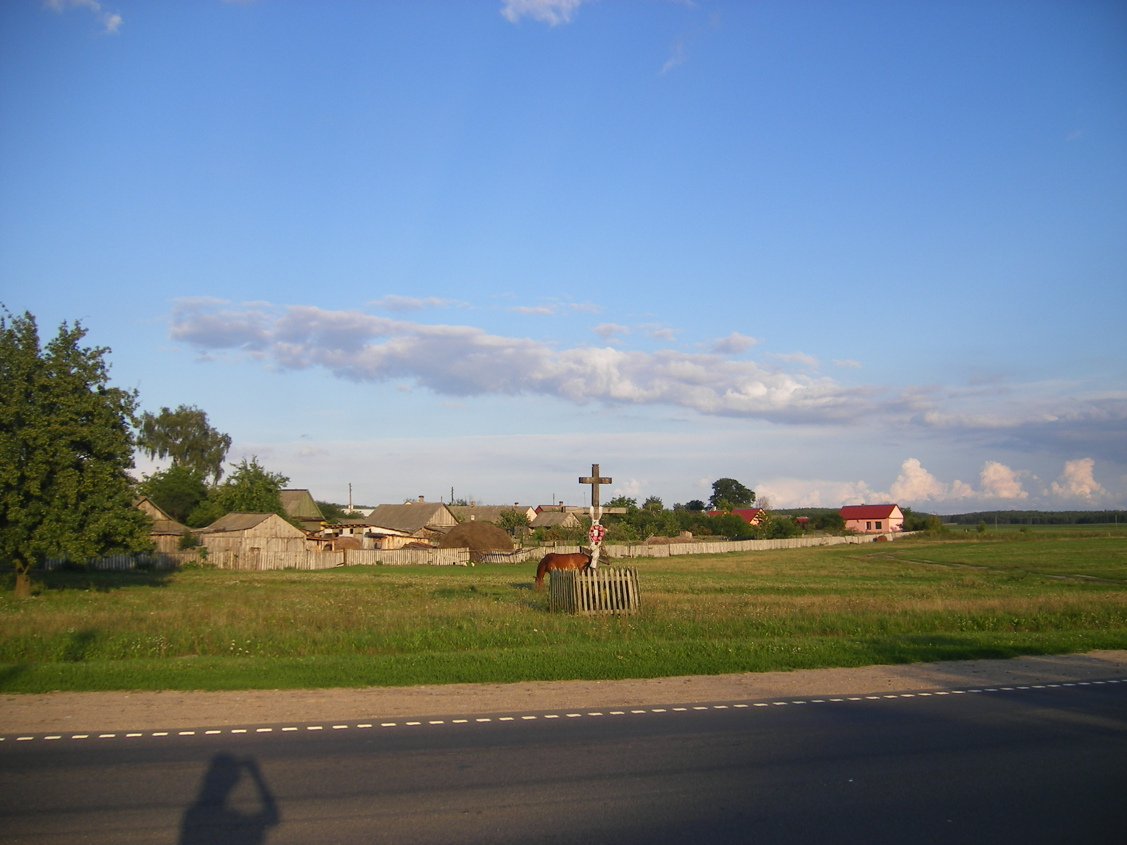 Vidomlya village, Kamyanets district